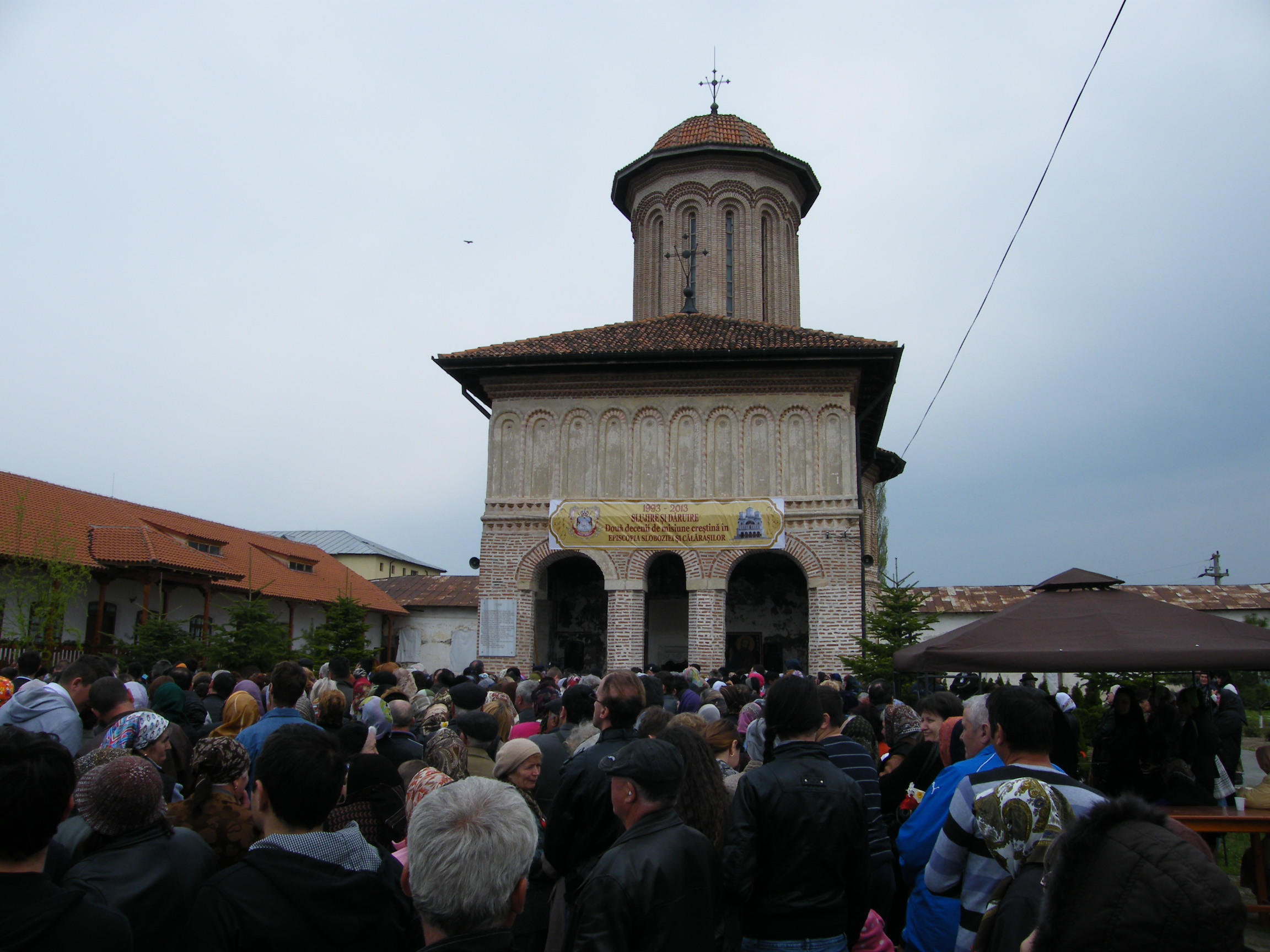 Imagine de la resfinţirea bisericii Mănăstirii Plătăreşti, aprilie, 2013